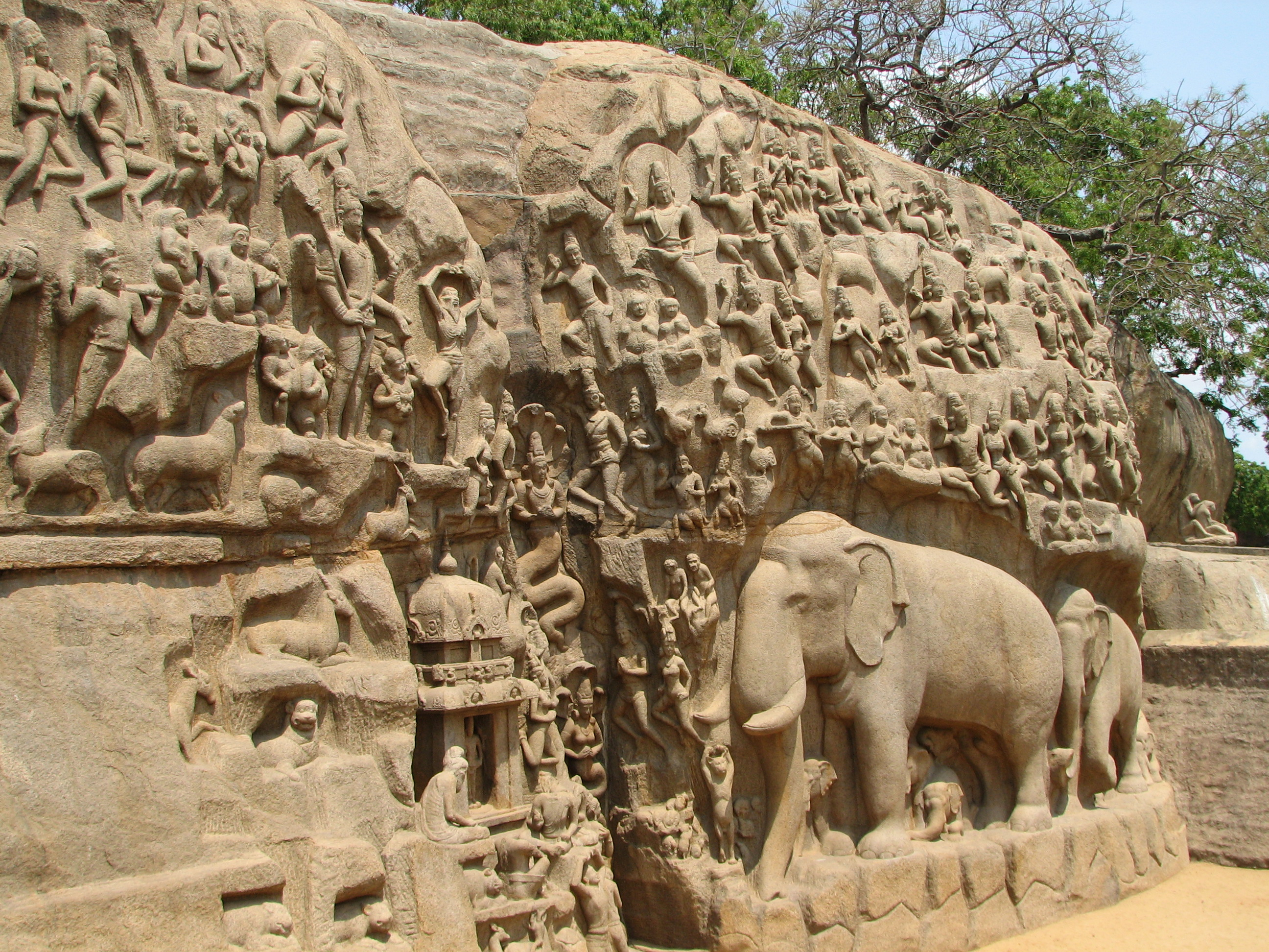 India - Mamallapuram - 030 - Arjuna's Penance Bas Relief